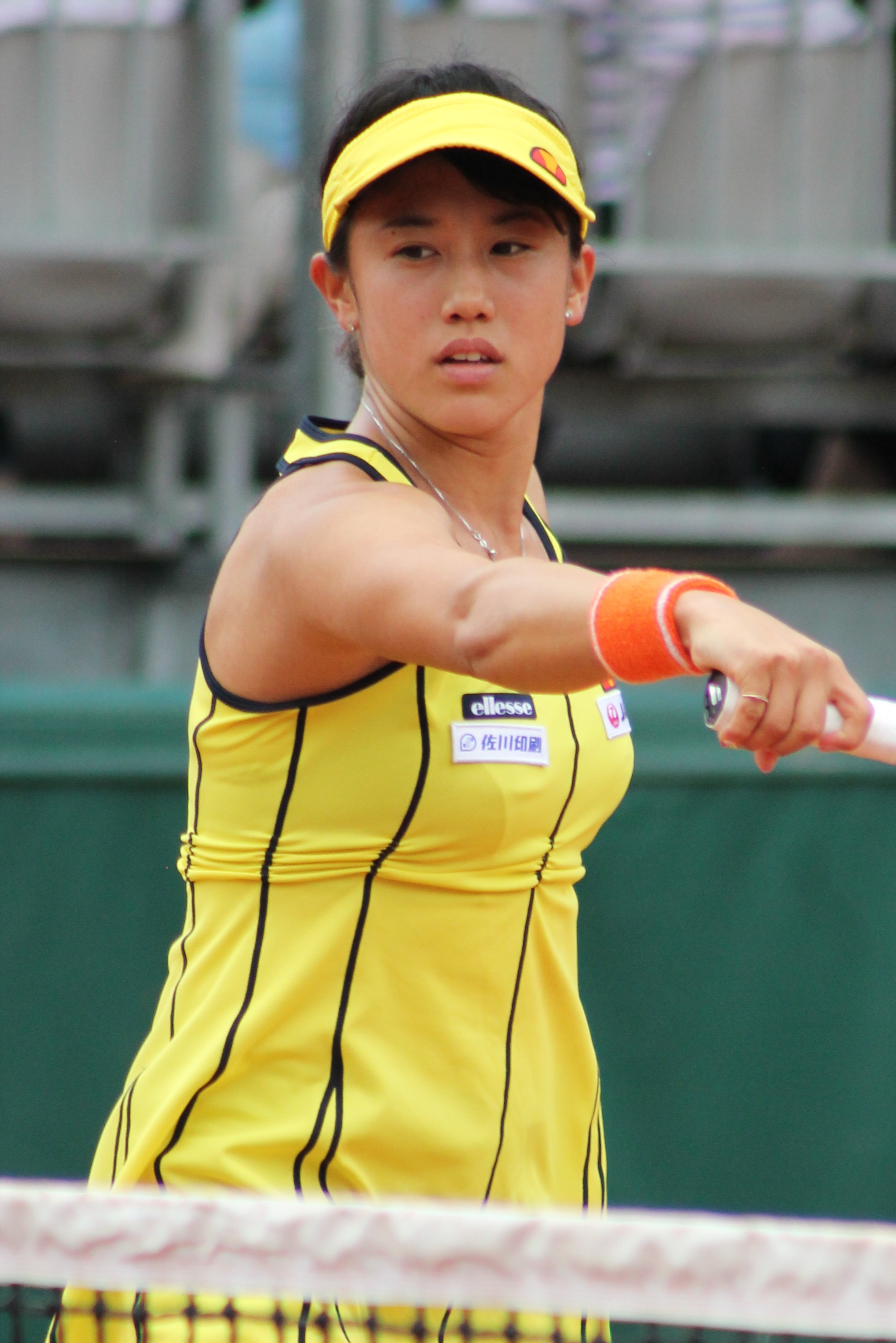 Kato RG16 (5)